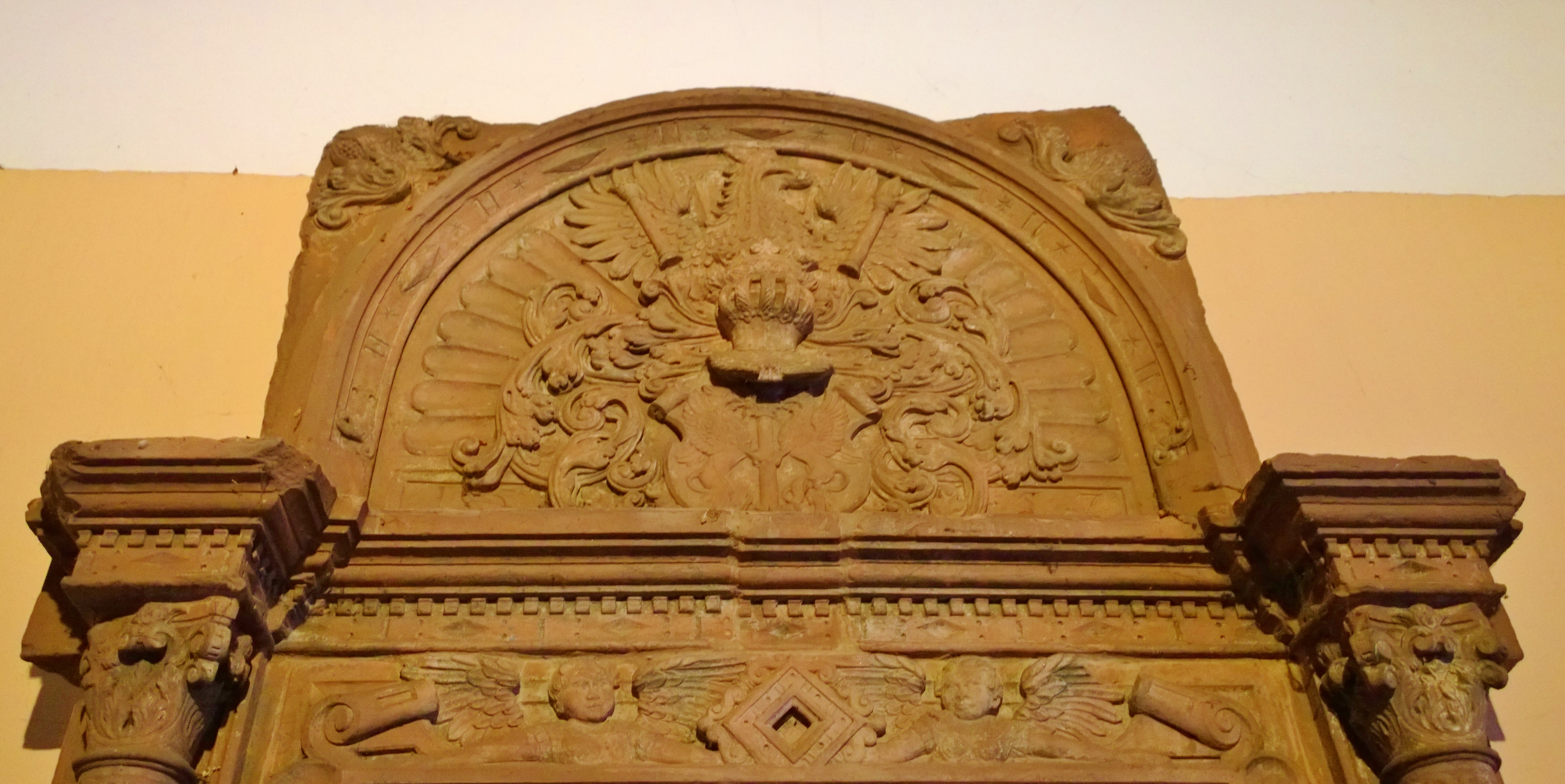 Oberteil des Epitaphs der Gebrüder Obernburger mit dem Wappen, verliehen von Karl V.